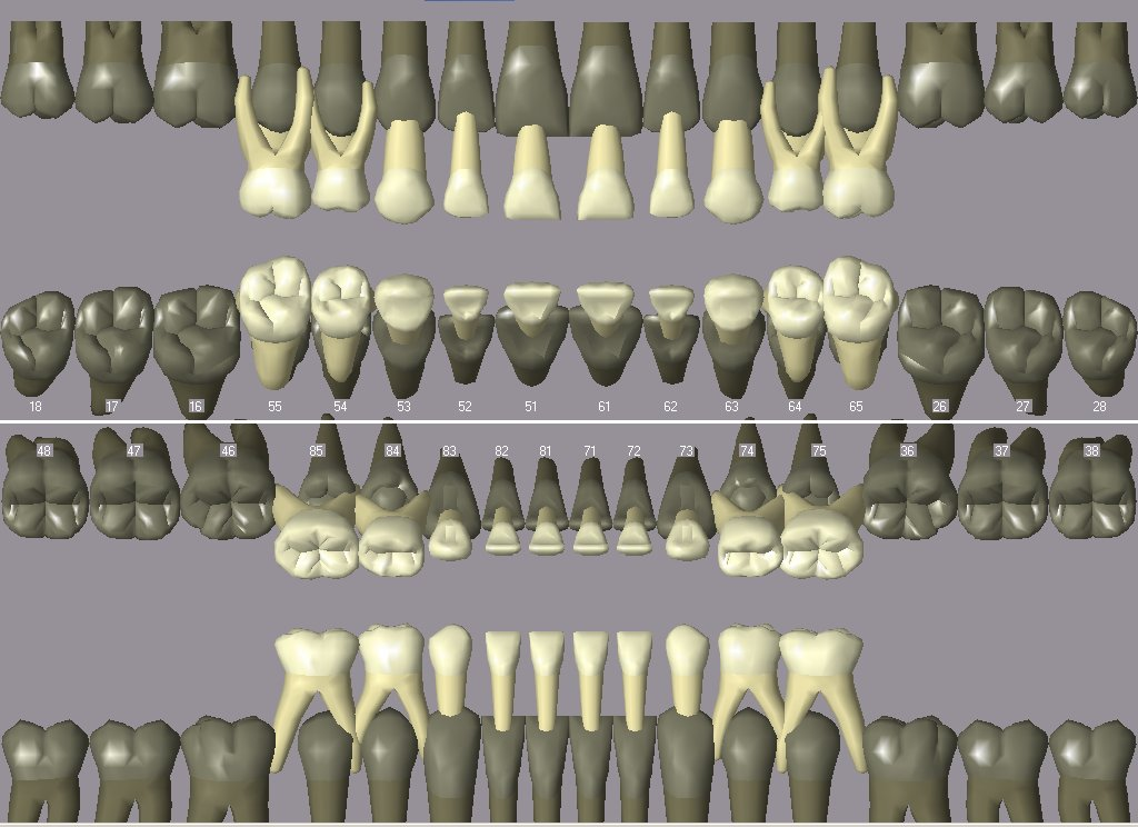 Primary dentition diagram